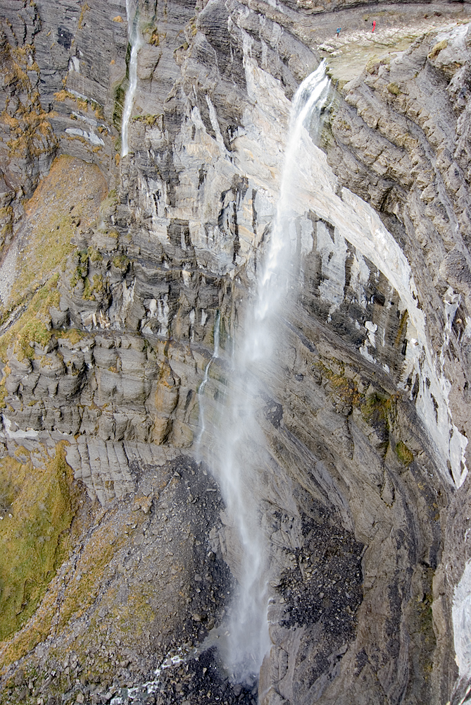 Hau da Delikako urjauzia begiralekutik ikusita. Ibaia, sinesgaitza bada ere, Nerbioi da. Delika (Bizkaia)